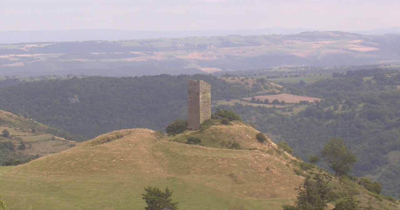 La tour de colombine - Molèdes (15) Cézallier France